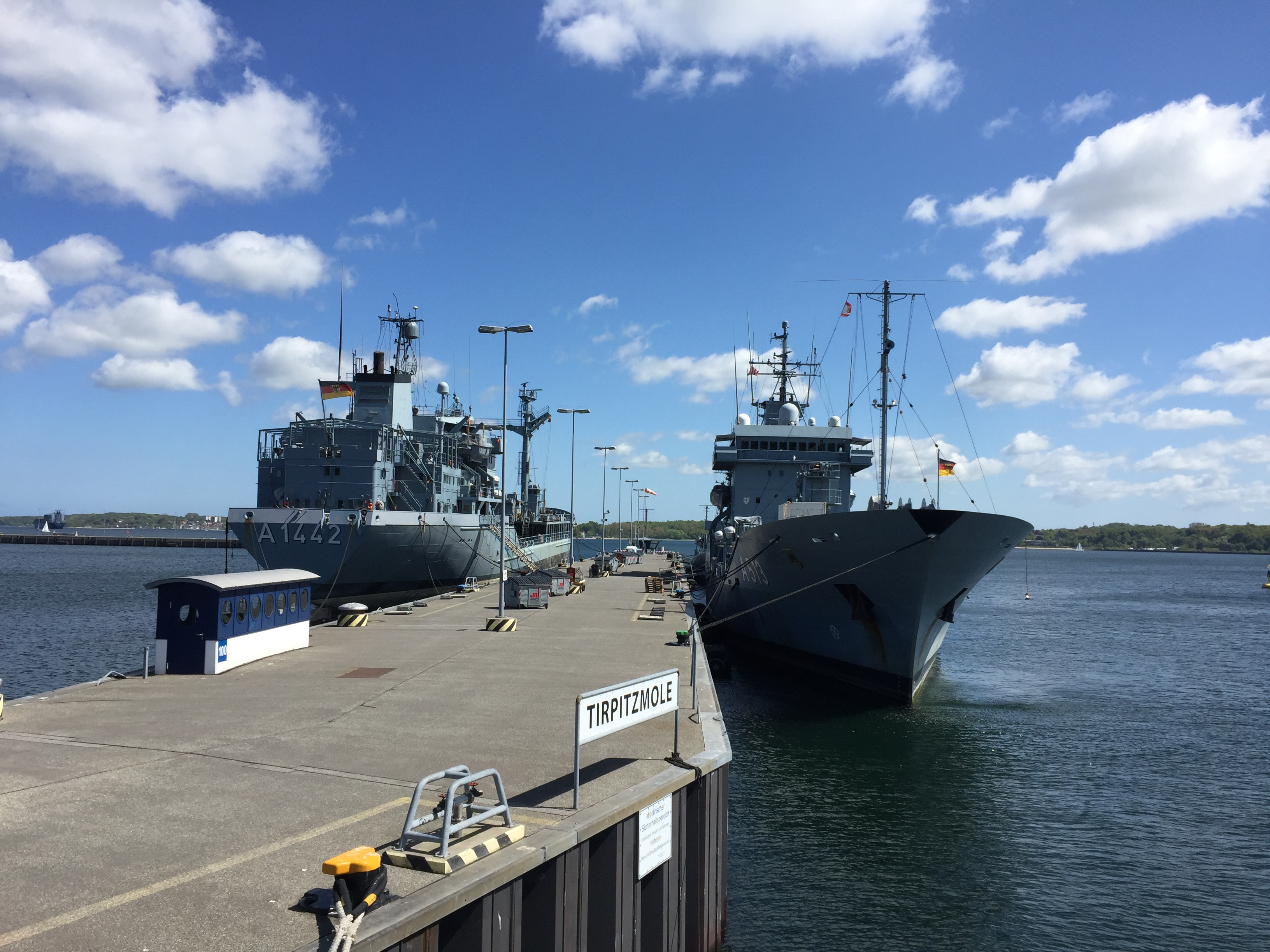 Tanker Spessart (A 1442), Tender Rhein (A 513) in Kiel